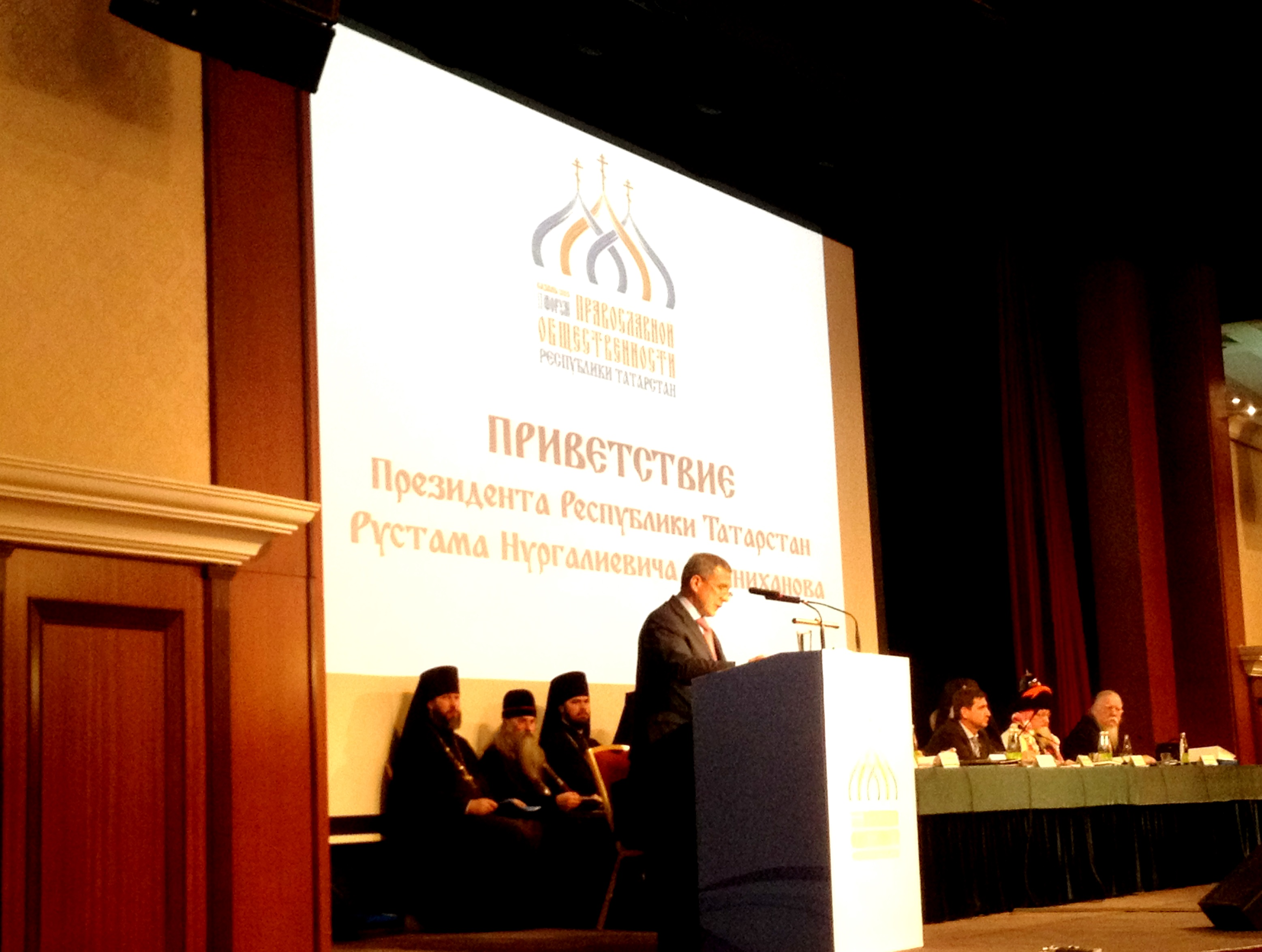 Выступление Президента Республики Татарстан Р.Н.Минниханова на II Форуме православной общественности Республики Татарстан